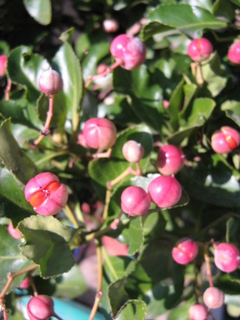 fruit en gros plan